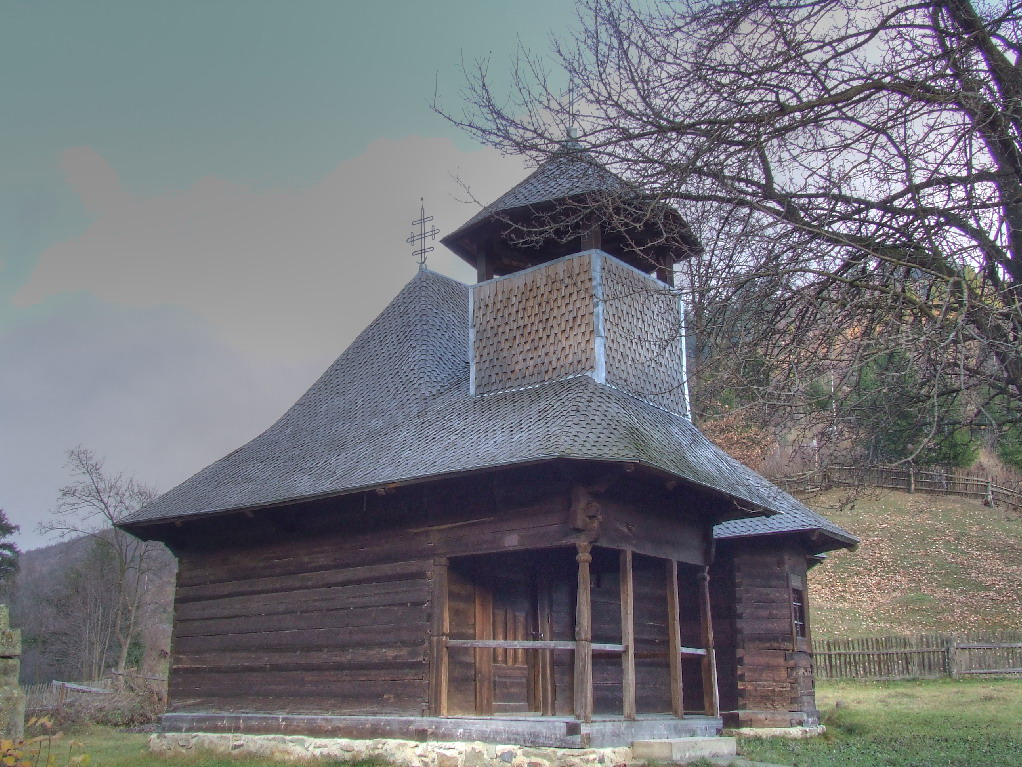 Biserica de lemn din Tulgheş, judeţul Harghita.